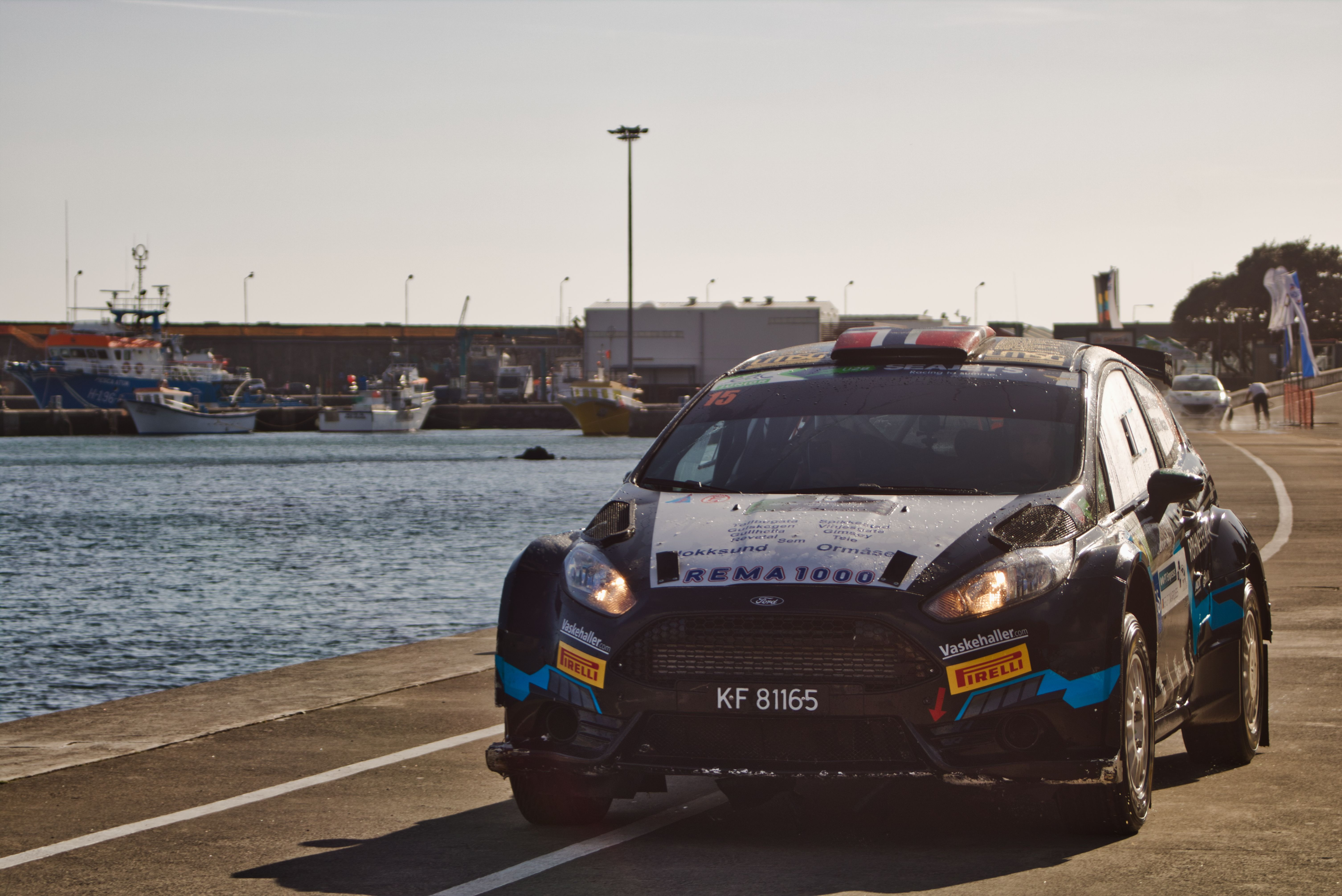 Frank Tore Larsen podczas Rajdu Azorów 2018